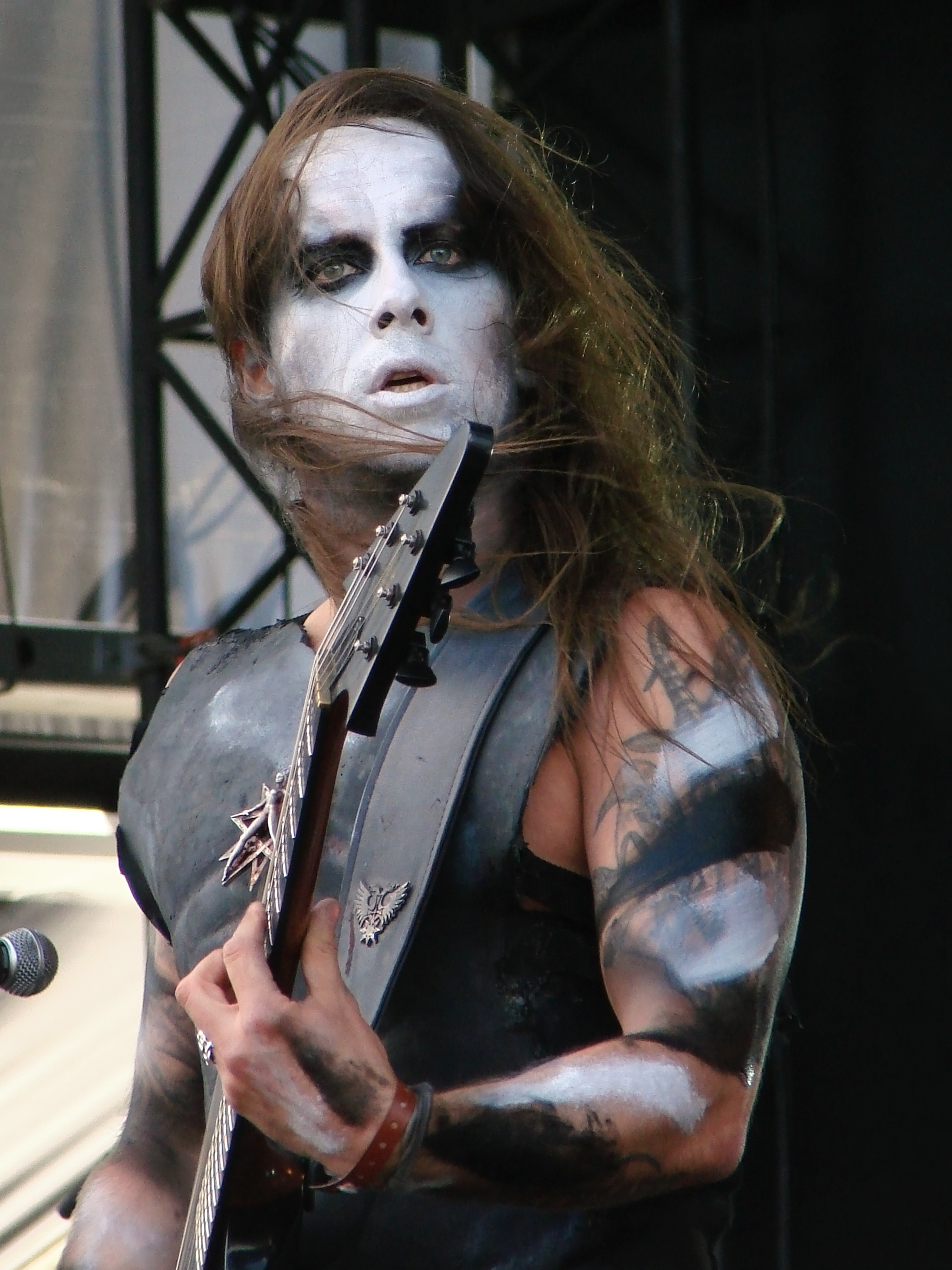 Behemoth au Hellfest, le 20 Juin 2010 : Nergal.